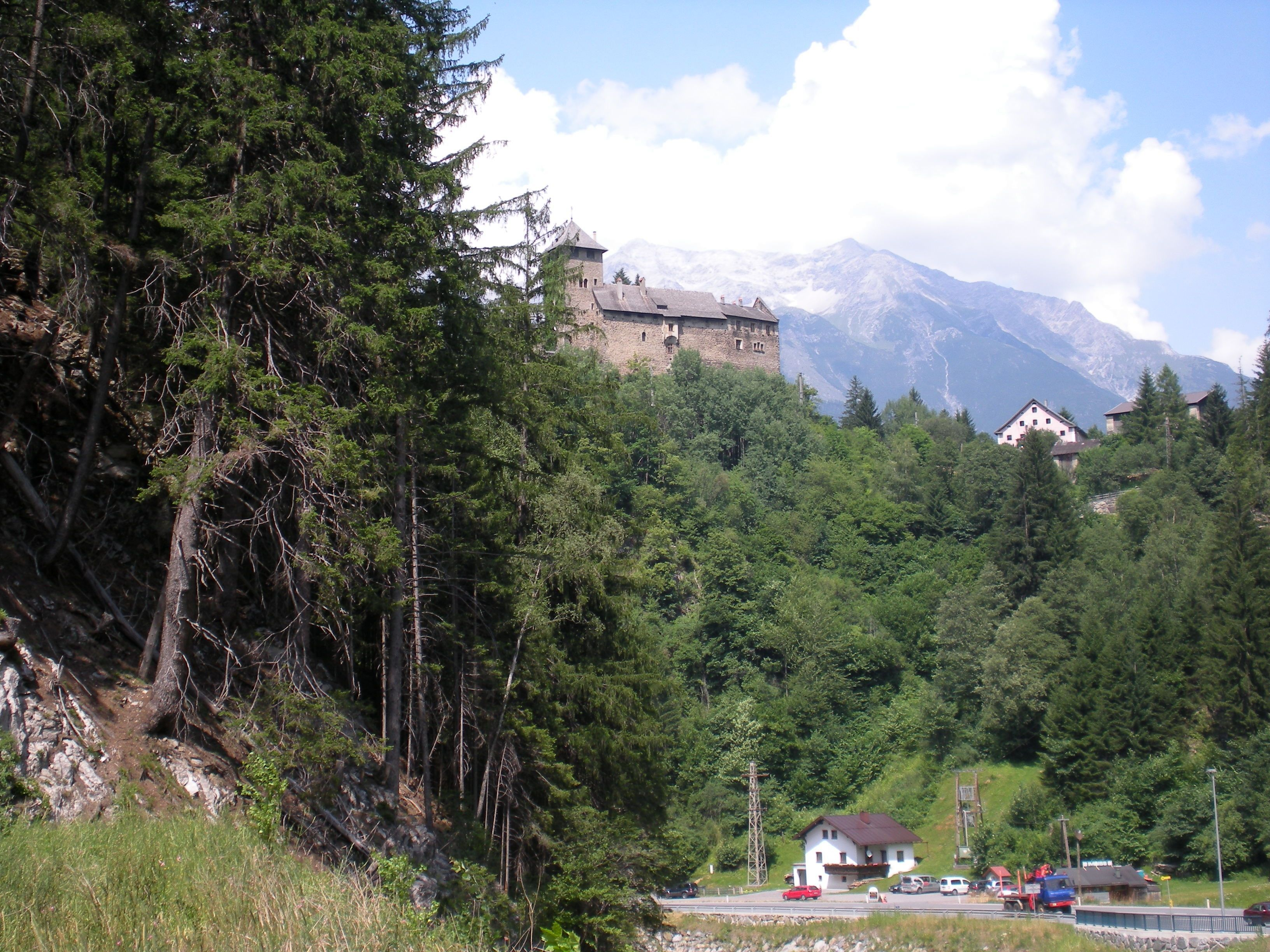 El Burg Wiesberg es un castillo medieval situado sobre un promontorio que domina la carretera B188 (Silvretta Hochalpenstrasse).